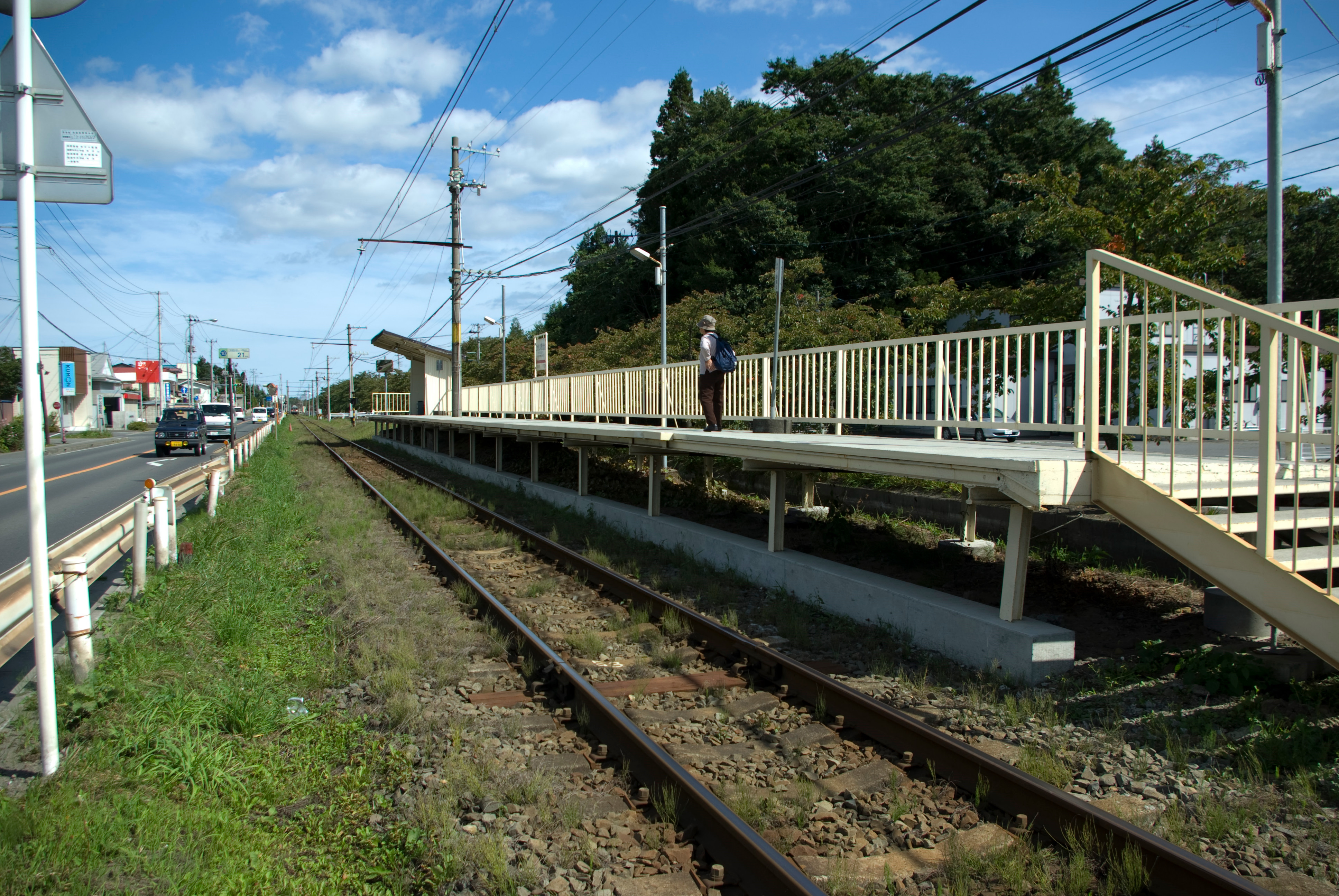 十和田観光電鉄ひがし野団地駅